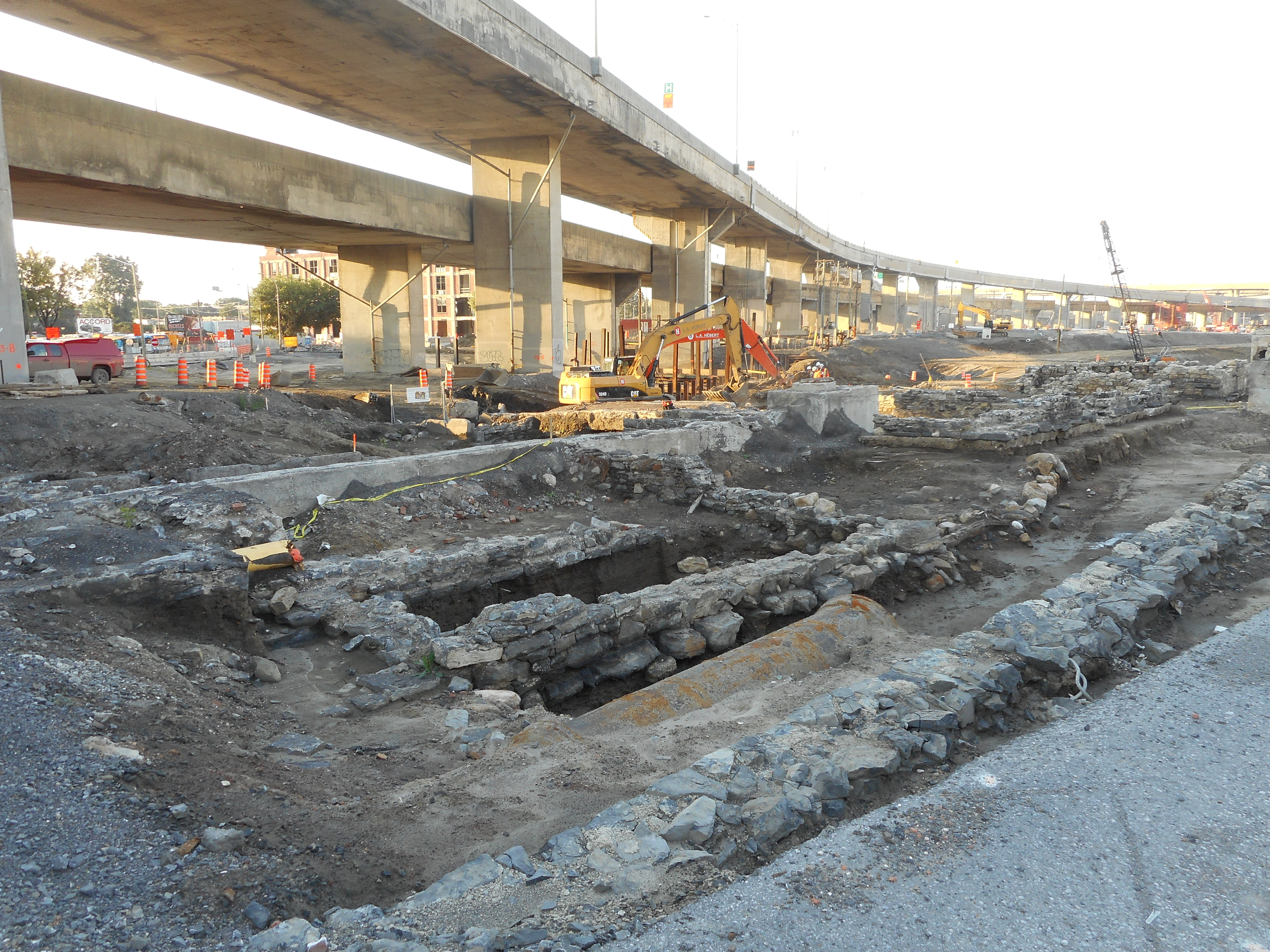 Site archéologique du village des Tanneries, sous l'échangeur Turcot, Montréal